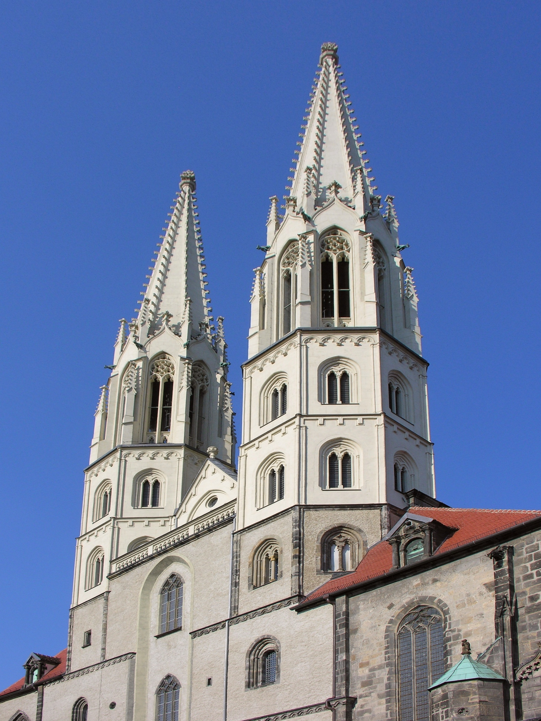 Görlitz Stadtkirche St. Peter und Paul Peterskirche Sachsen Saxony Germany Foto 2007 Wolfgang Pehlemann Wiesbaden DSCN1237